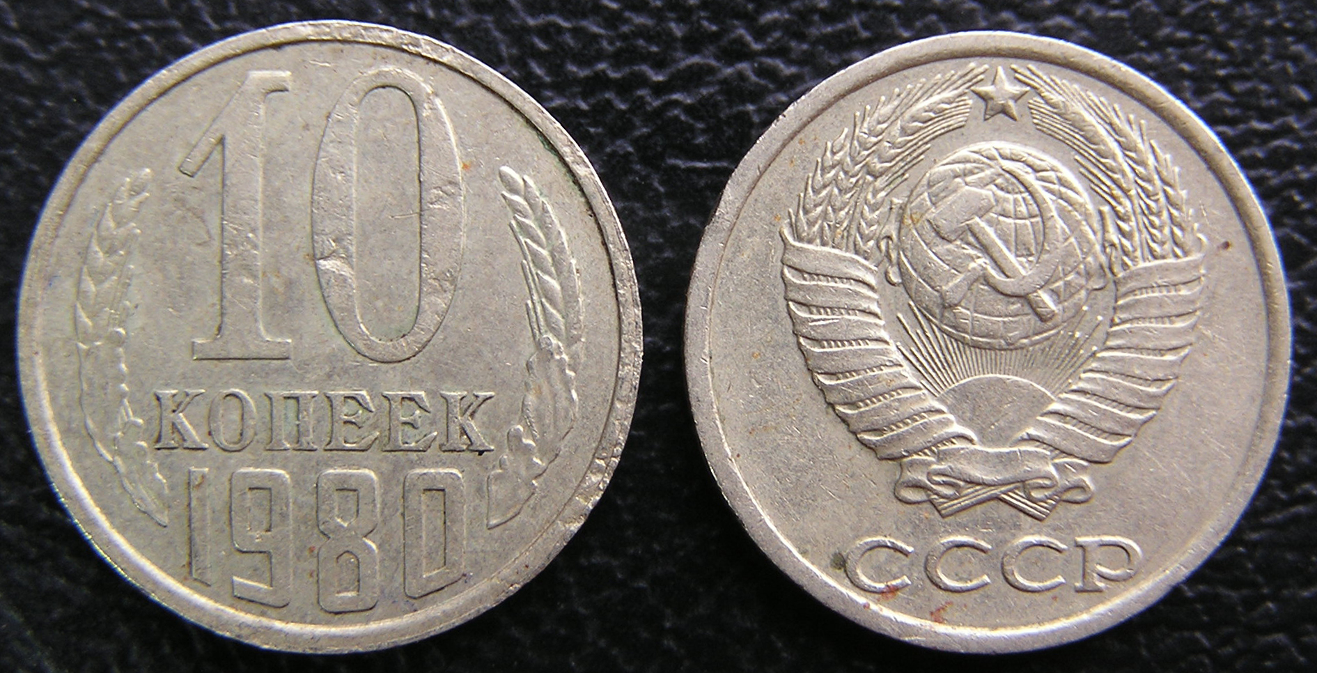 Советская монета номиналом в 10 копеек